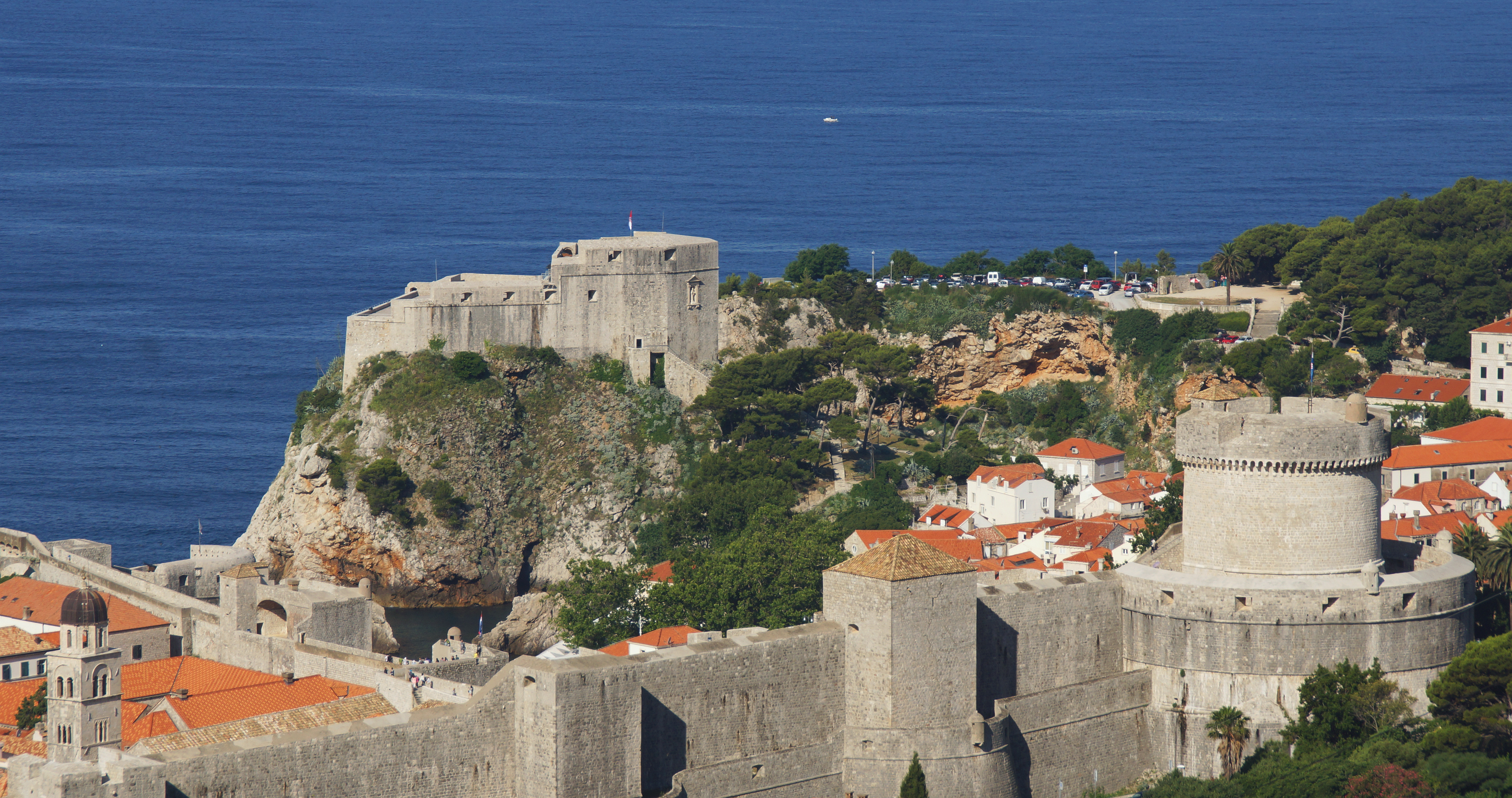 Dubrovnik Blick über Stadtmauer auf den vorgelagerten Felsen mit der Festung Lovrijenac aus dem 14.-16. Jahrhundert - Hrvatska Kroatien - Foto Wolfgang Pehlemann DSC05235